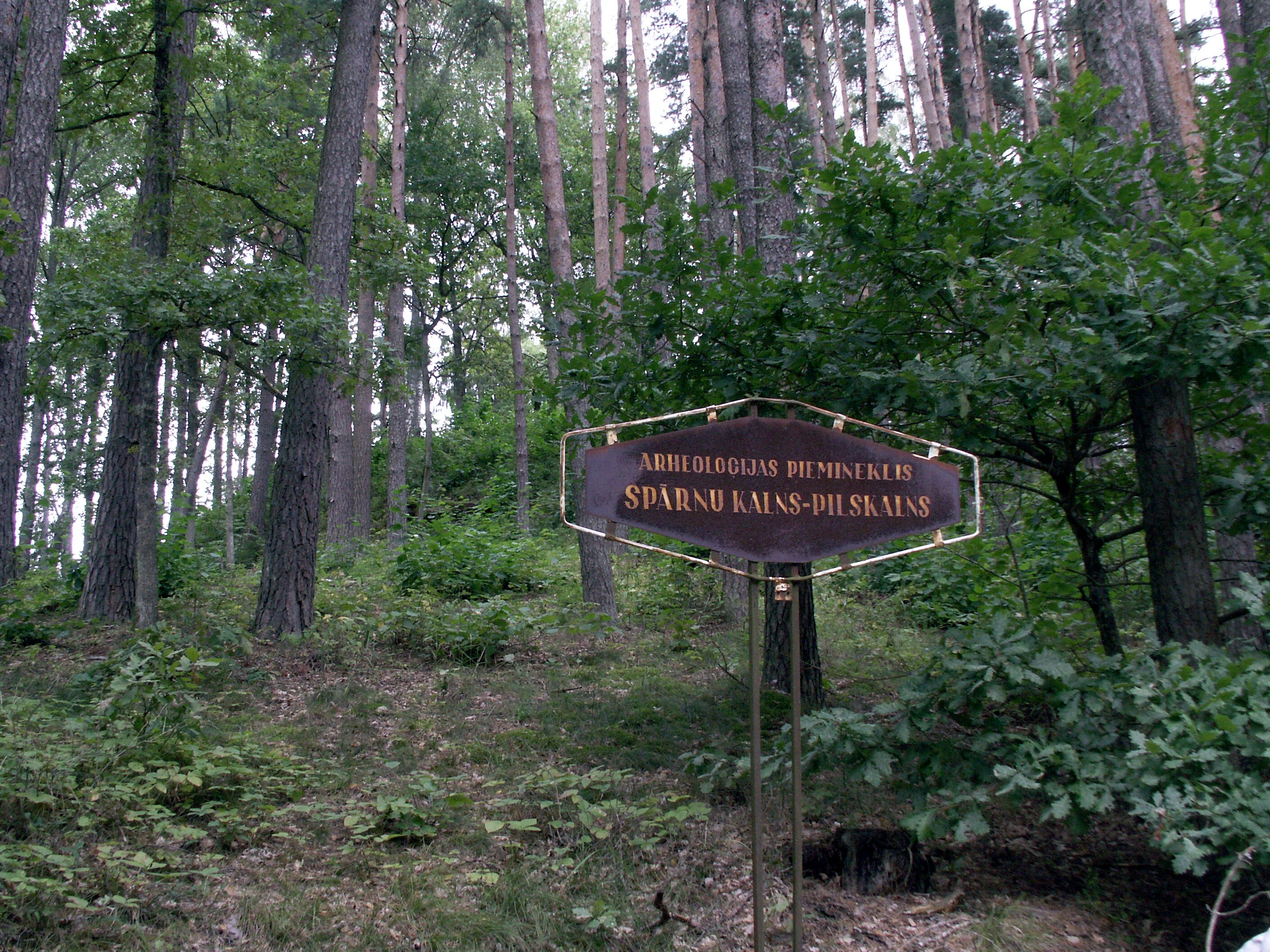 Sparnų piliakalnis, Ylės pagastas, Latvija